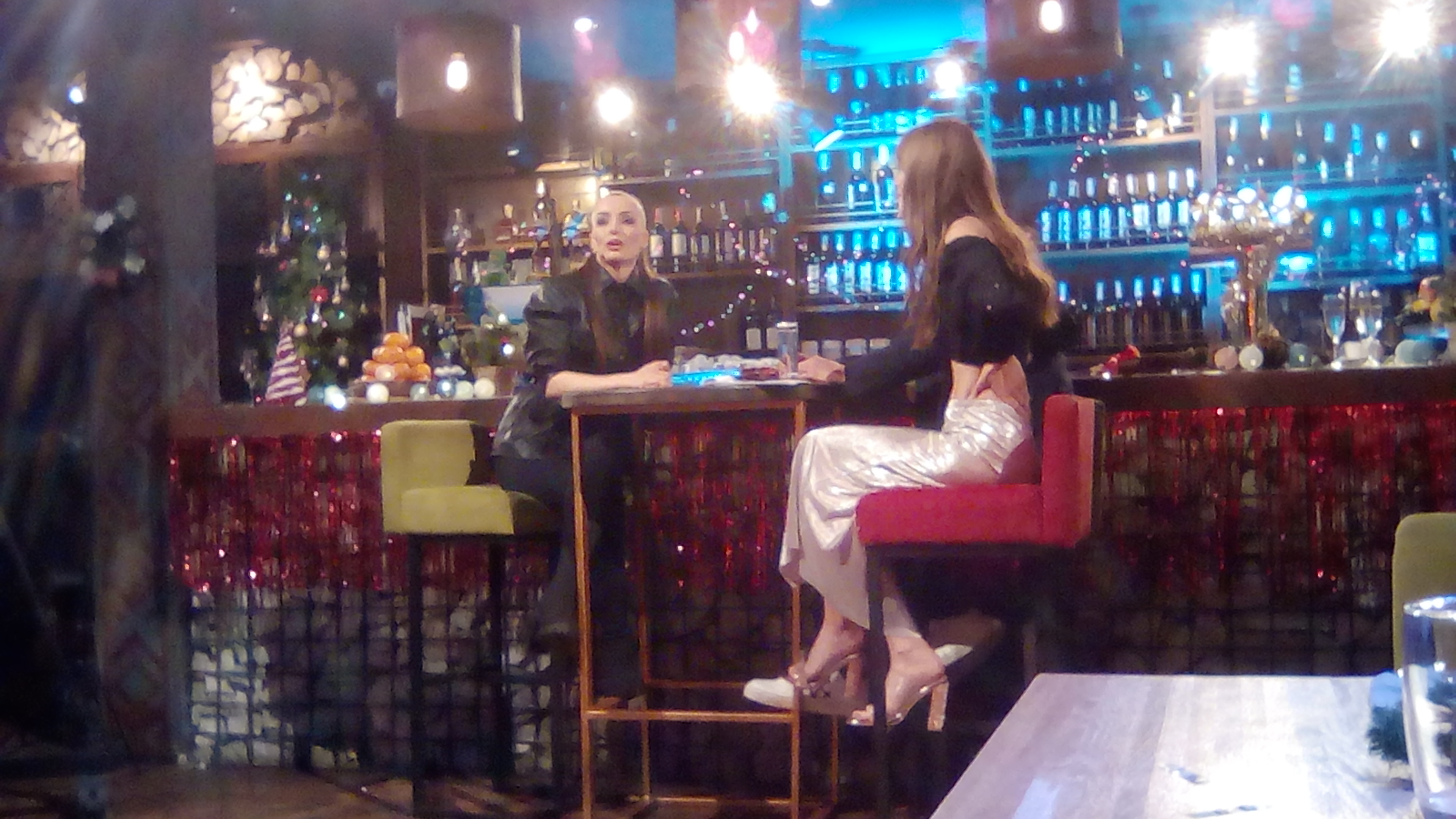 Шоу Килька пародий